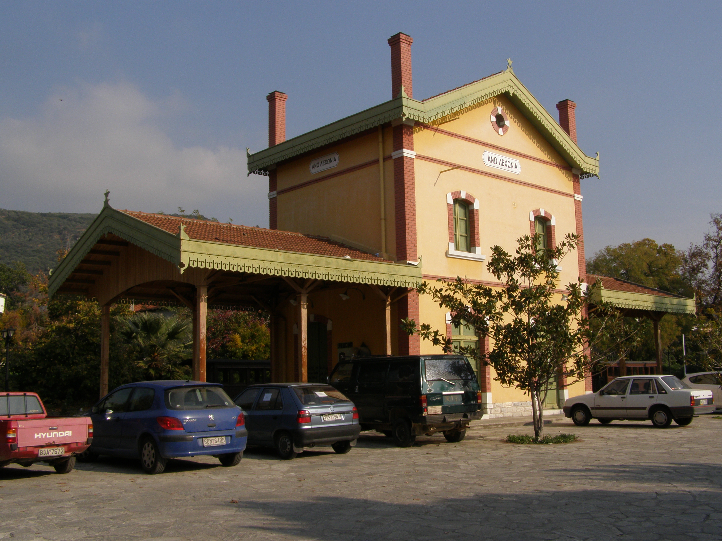 Ο σταθμός του τρένου στα Άνω Λεχώνια Μαγνησίας.